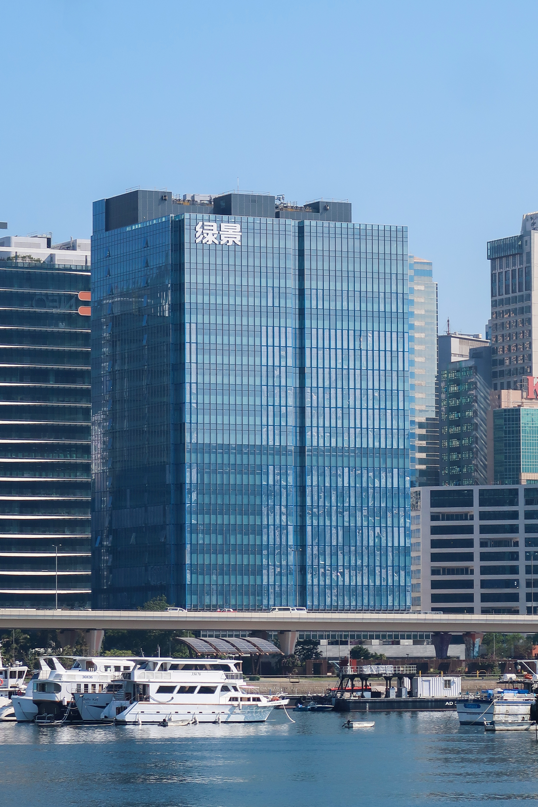 NEO site view